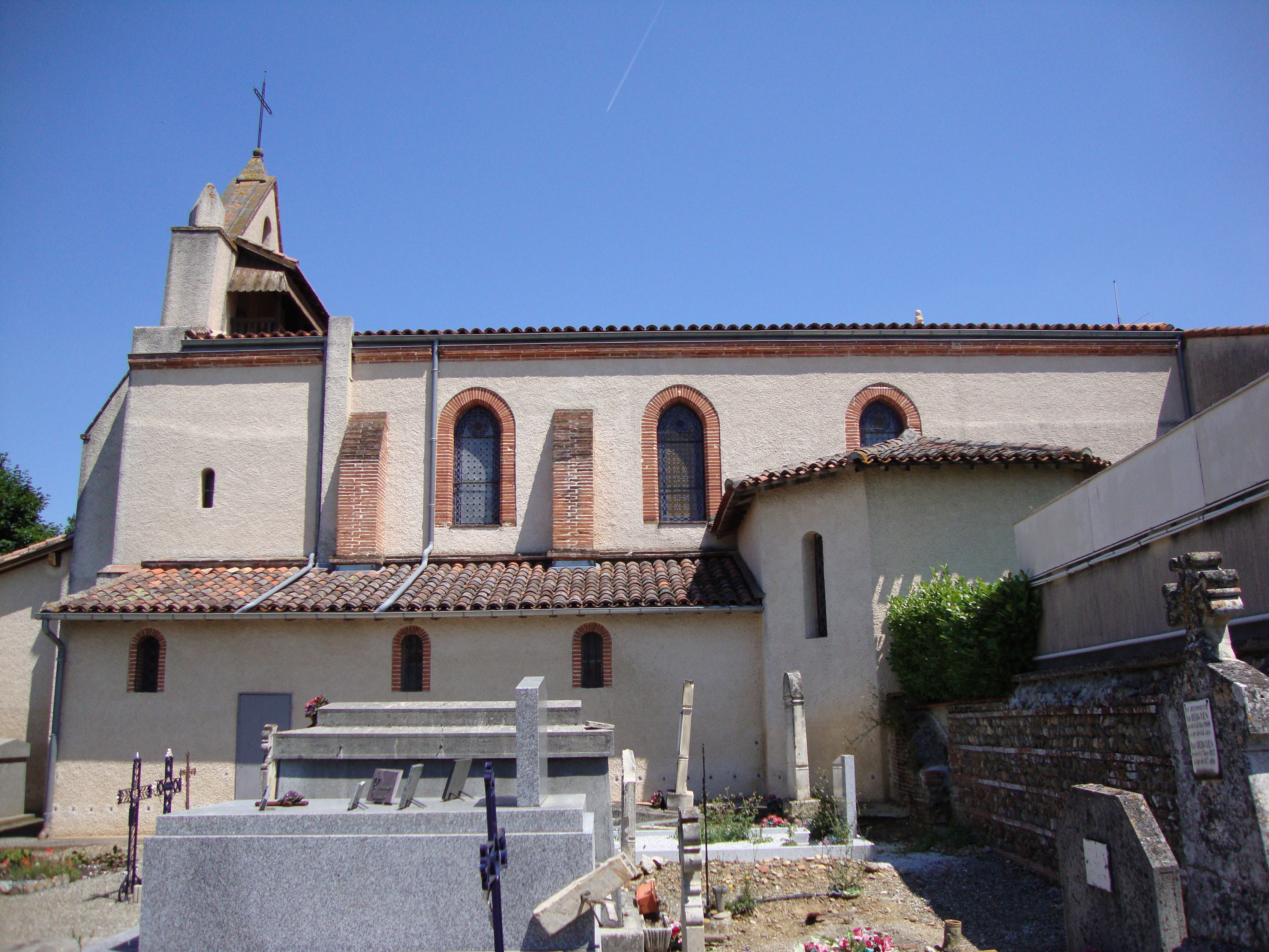 La Salvetat-Saint-Gilles (Haute-Garonne, Fr) église vue du cimetière.